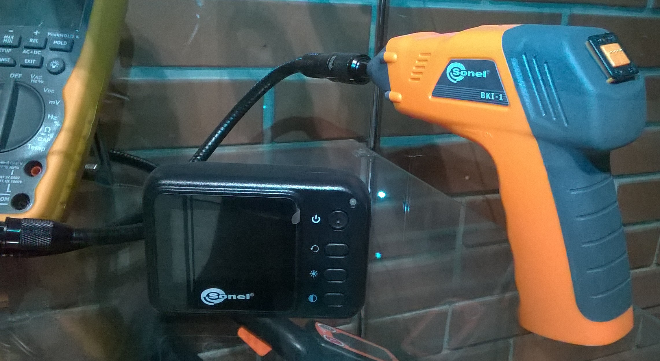 Bezprzewodowa kamera inspekcyjna - produkt TVBTech sygnowany logo SONEL